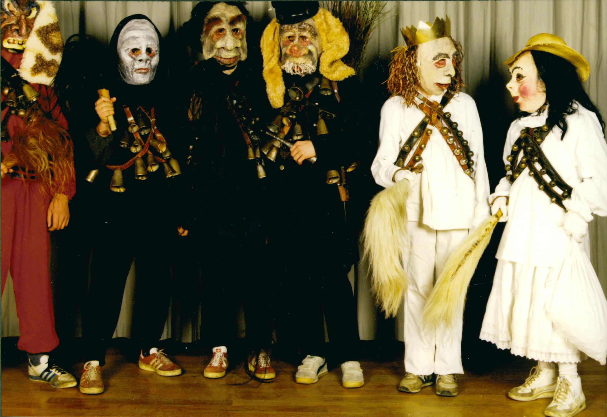 Die Chlausgruppe mit den neuen Larven. Brauchtum in Hallwil, 1984.